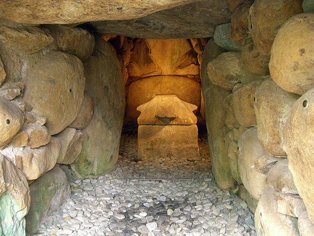 Shizuhatayama Kofun, Interior, Shizuoka 賤機山古墳